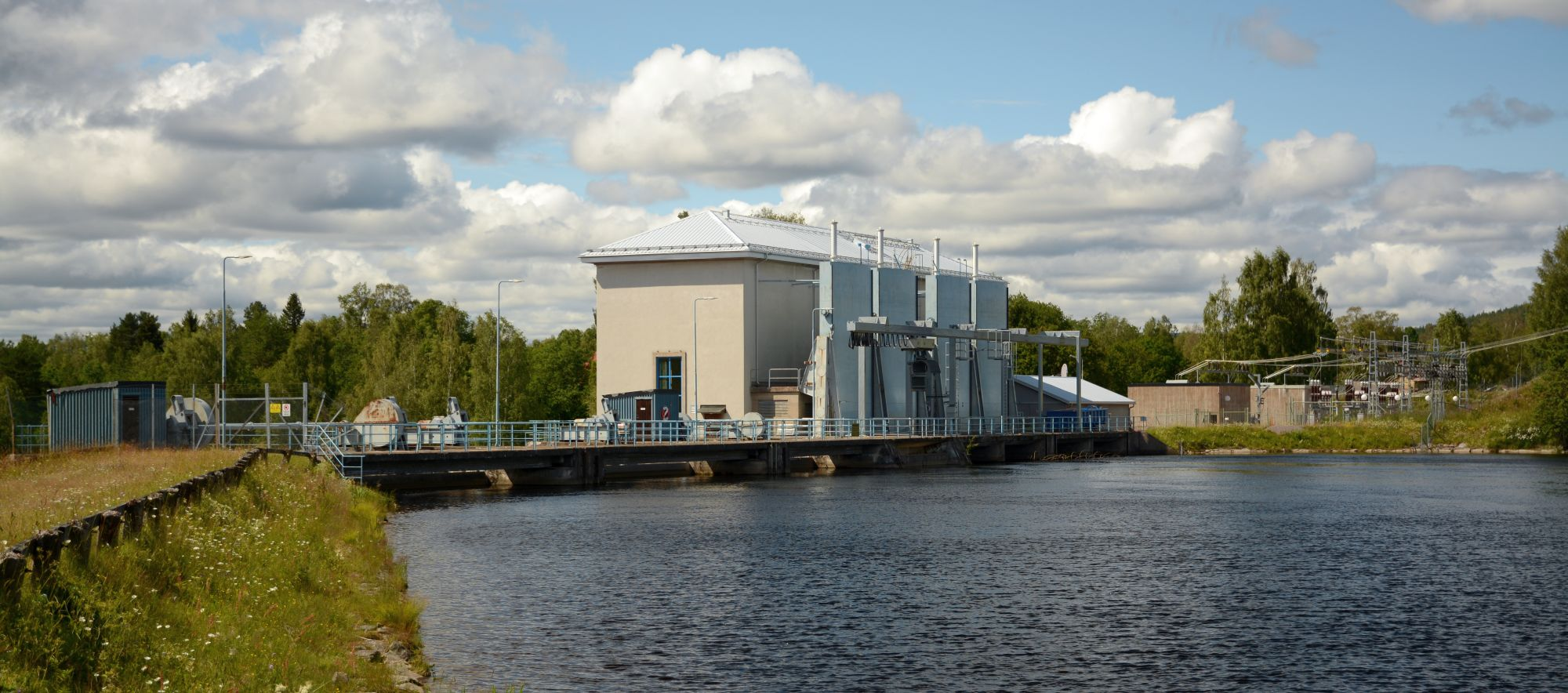 Gråda kraftverk sedd uppströms